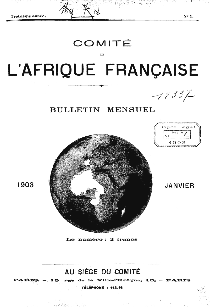 Bulletin du Comité de l'Afrique française, 1903